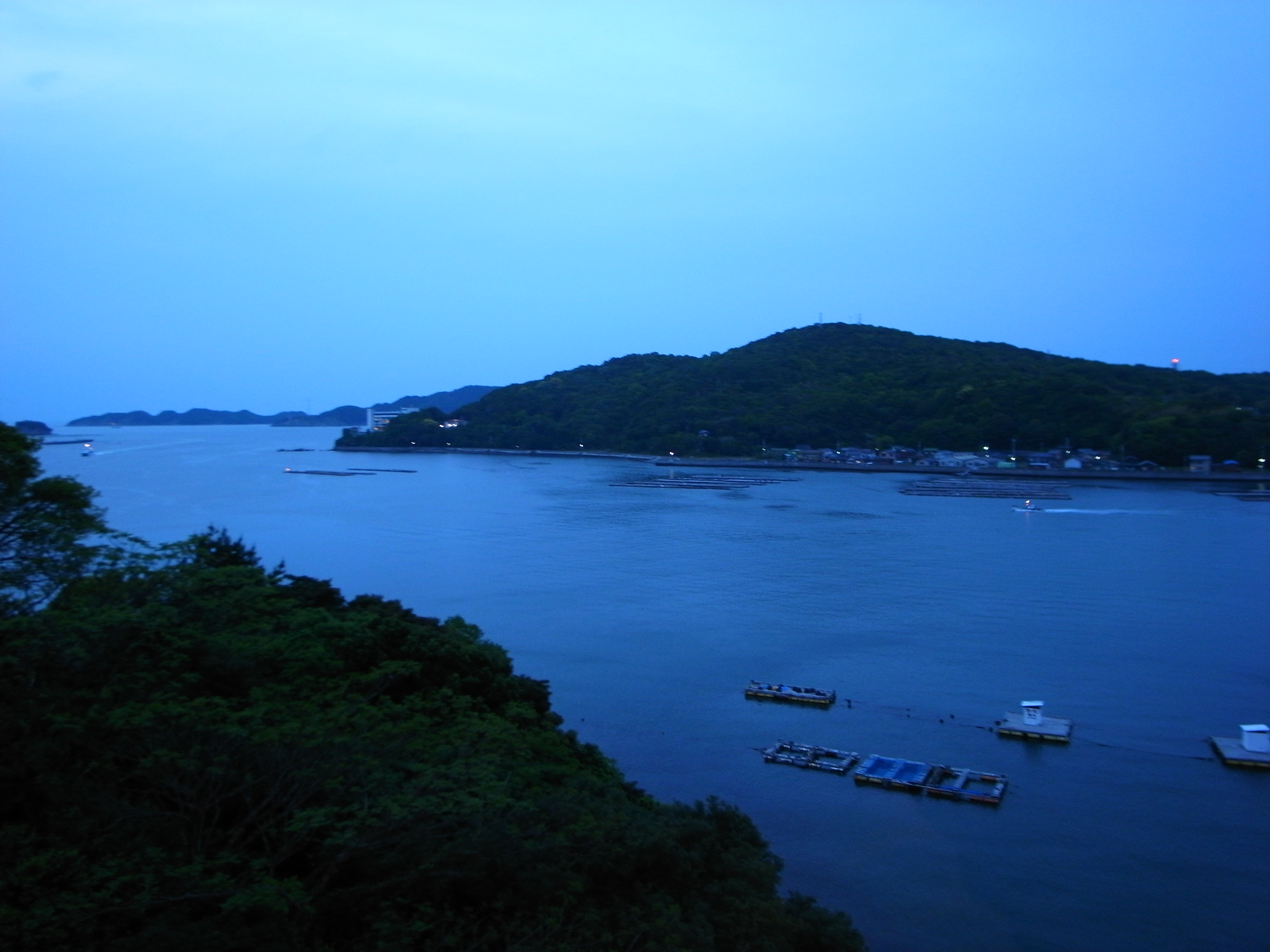 鳥羽港の夕暮れ。